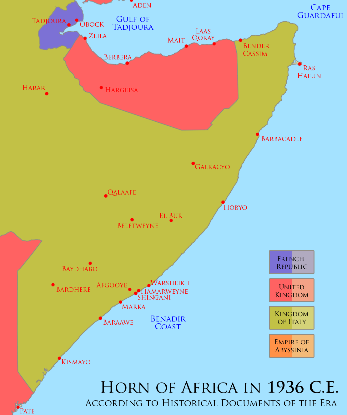 Somali lands in 1936